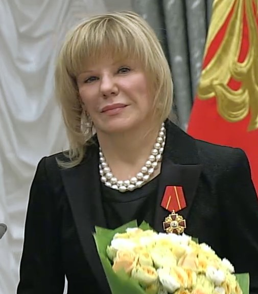 Награждение орденом Александра Невского народной артистки РФ Александрой Захаровой. 21 ноября 2019. Москва, Кремль.